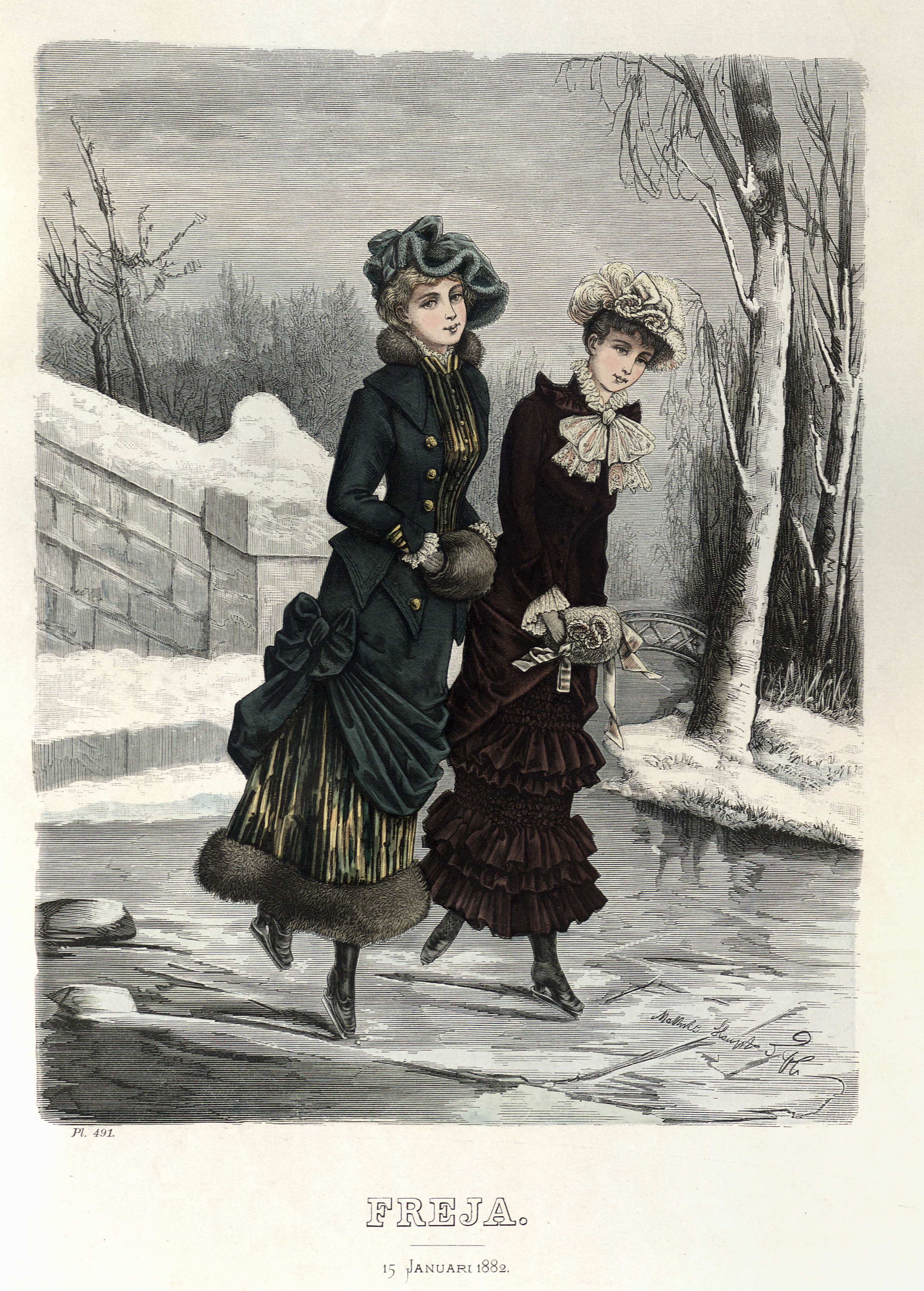 Klänning; Skridskor; Kappa; Hatt; Plymer; Muff; Band; Spets